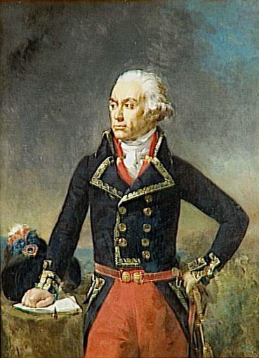 posthumous portrait, Paris 1834